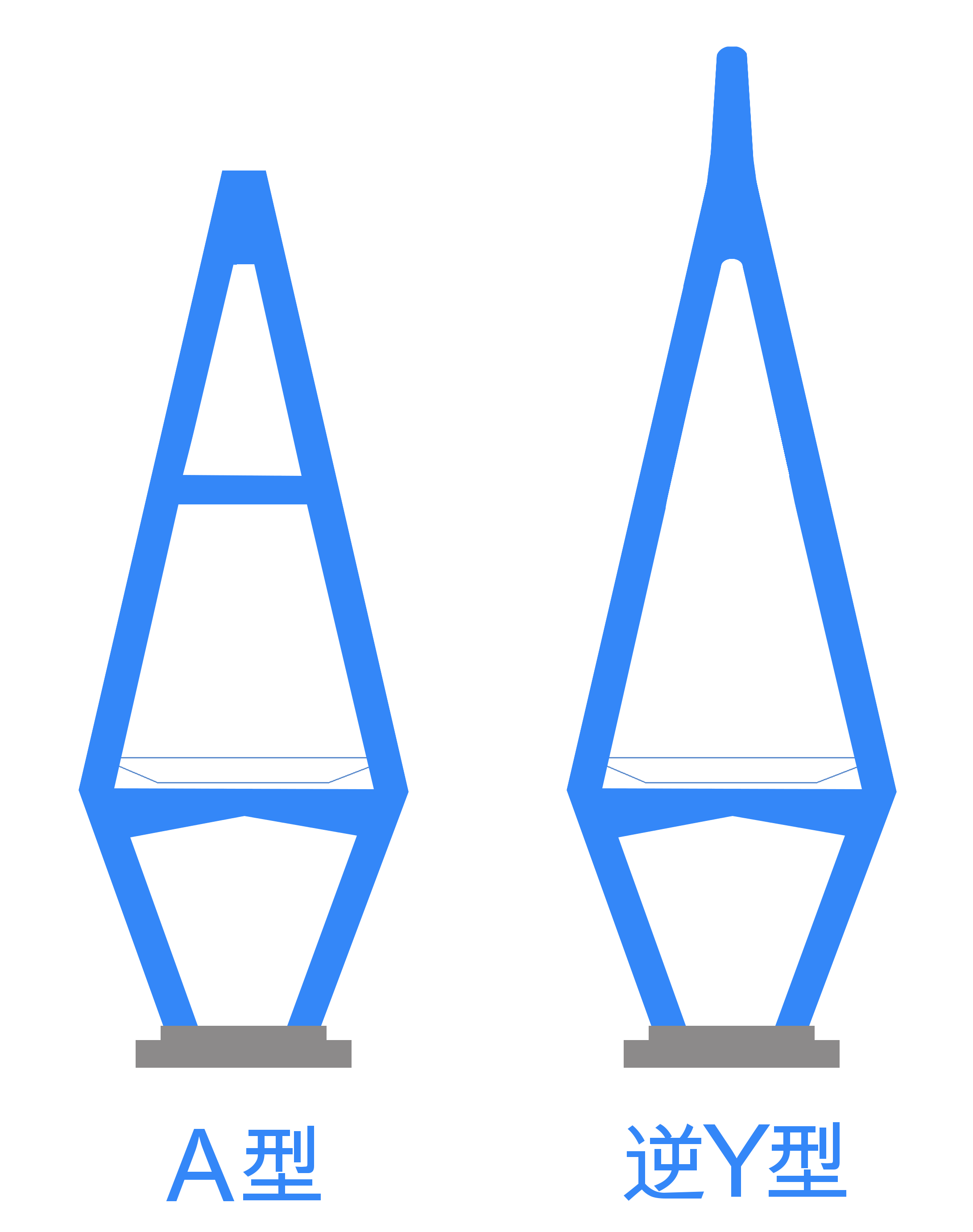 名港東大橋主塔形状案。設計段階では逆Y型も検討された。（典拠：『橋梁』Vol.28 No.9 1992年9月 37-38頁）